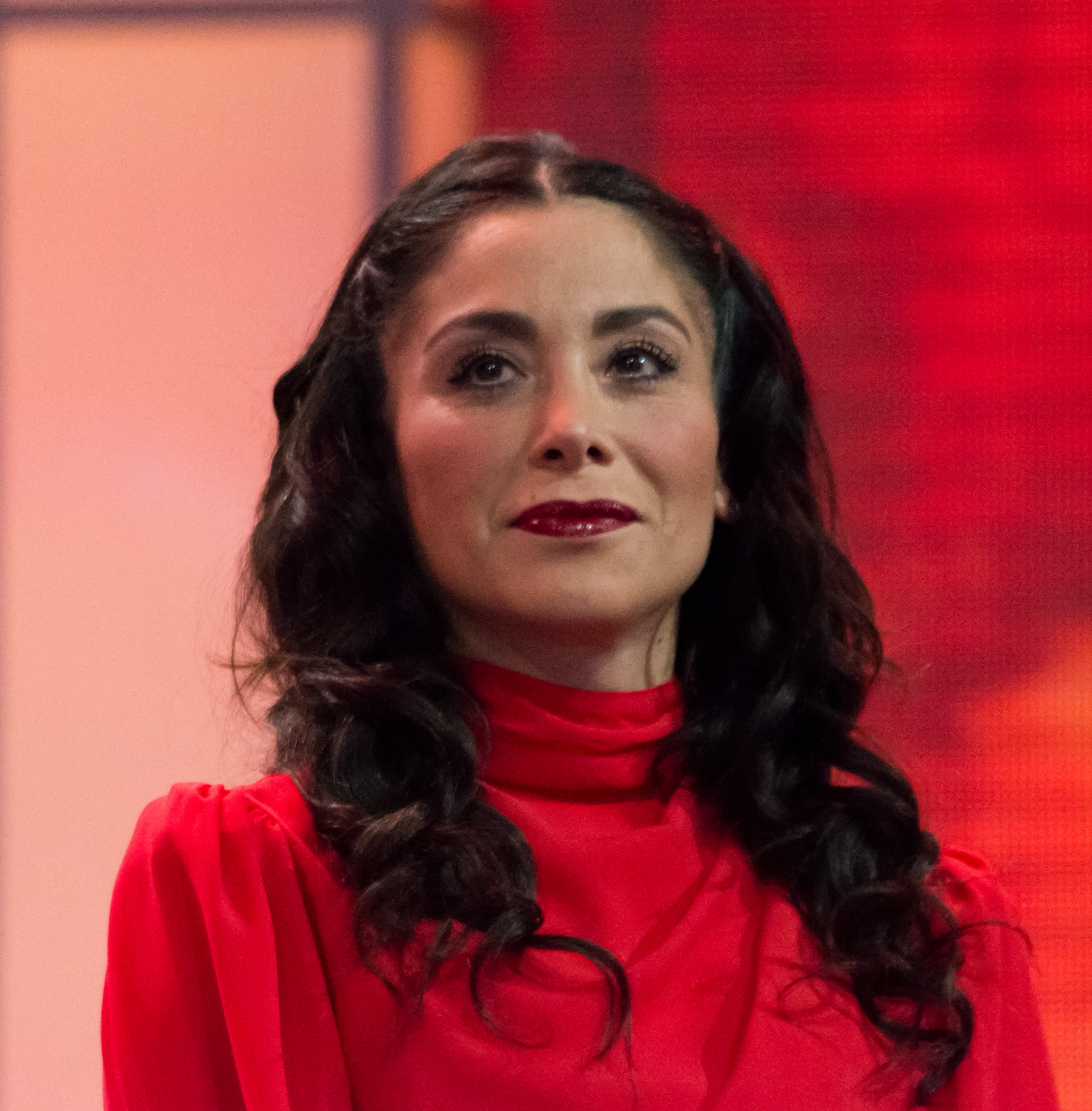 Yamna Lobos, Rojo, Televisión Nacional de Chile, Santiago, Chile.